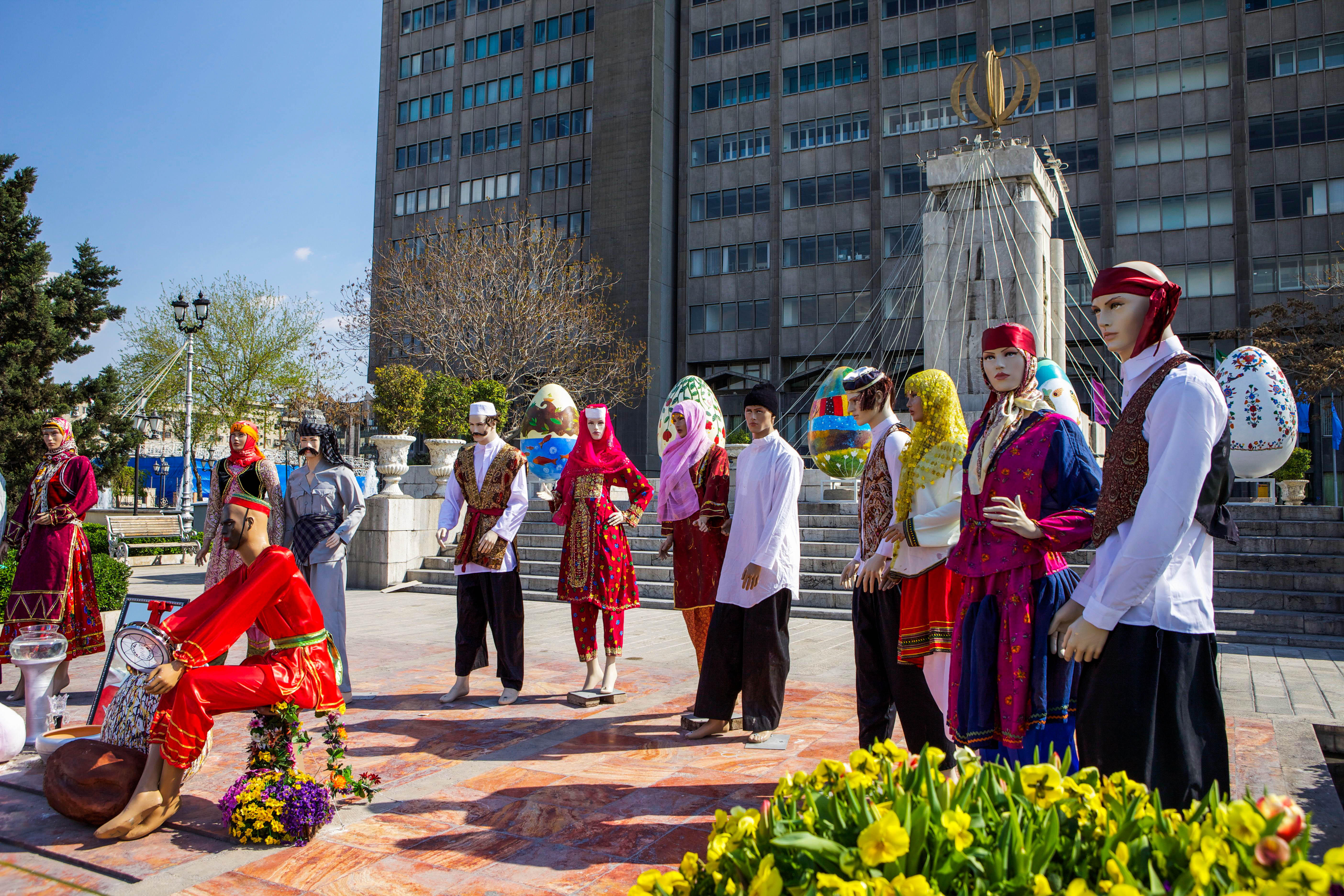 Nowruz in Tehran